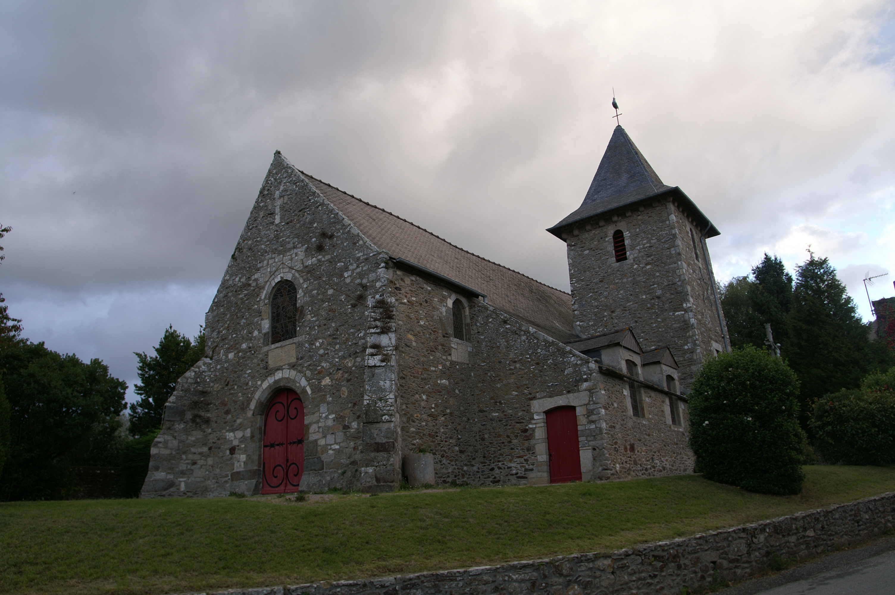 Église Saint-Laurent de Tréméreuc.